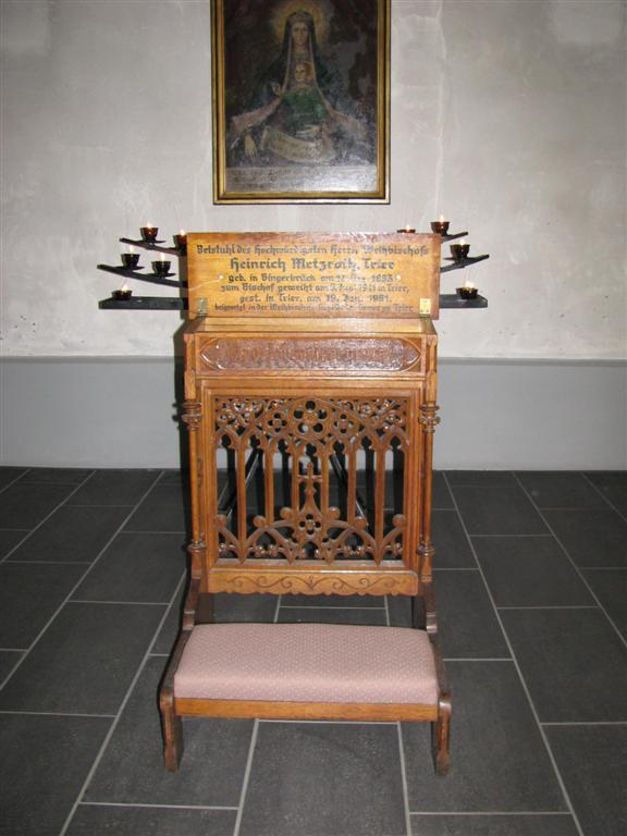 Betstuhl von Weihbischof Heinrich Metzroth. Standort: Katholisch Pfarrkirche St.Rupertus und St.Hildegard in Bingen-Bingerbrück.